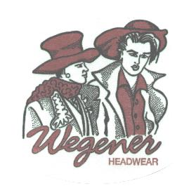 Logo R&M Wegener Headwear